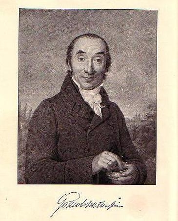 Johann Gottlob Nathusius (* 30. April 1760 in Baruth/Mark; † 23. Juli 1835 in Althaldensleben), Portrait mit Tabakdose